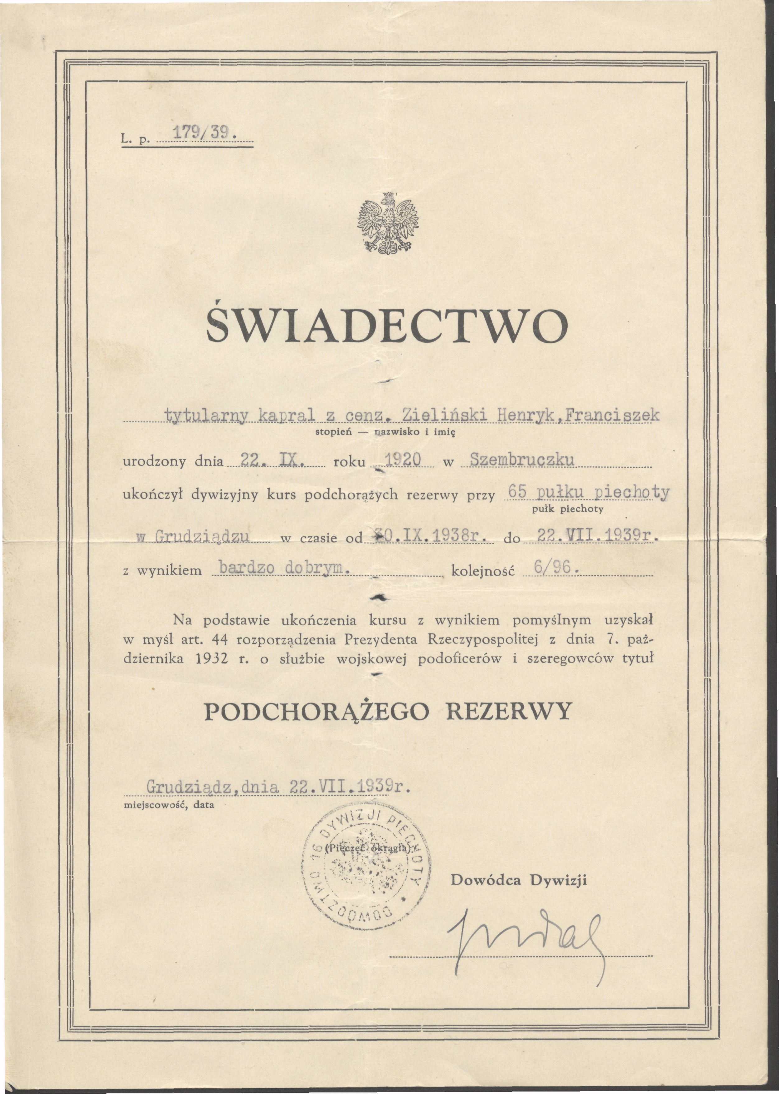 Henryk Zieliński - świadectwo ukończenia podchorążówki